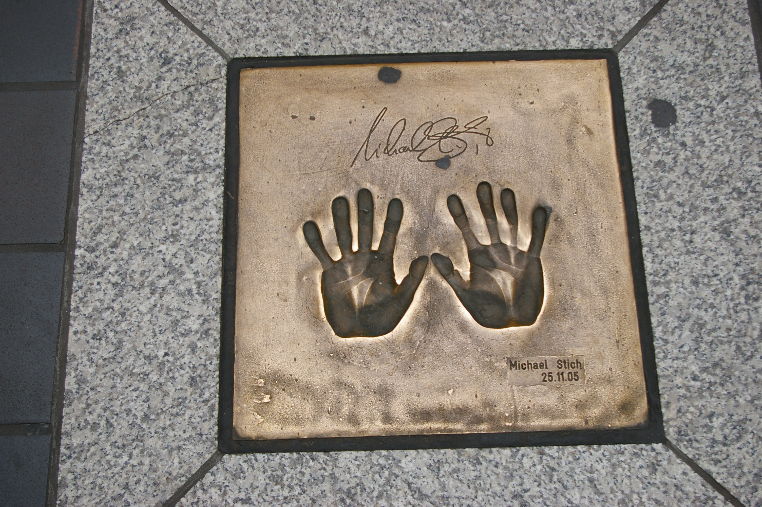 Handeabdruck in der Lloyd Passage